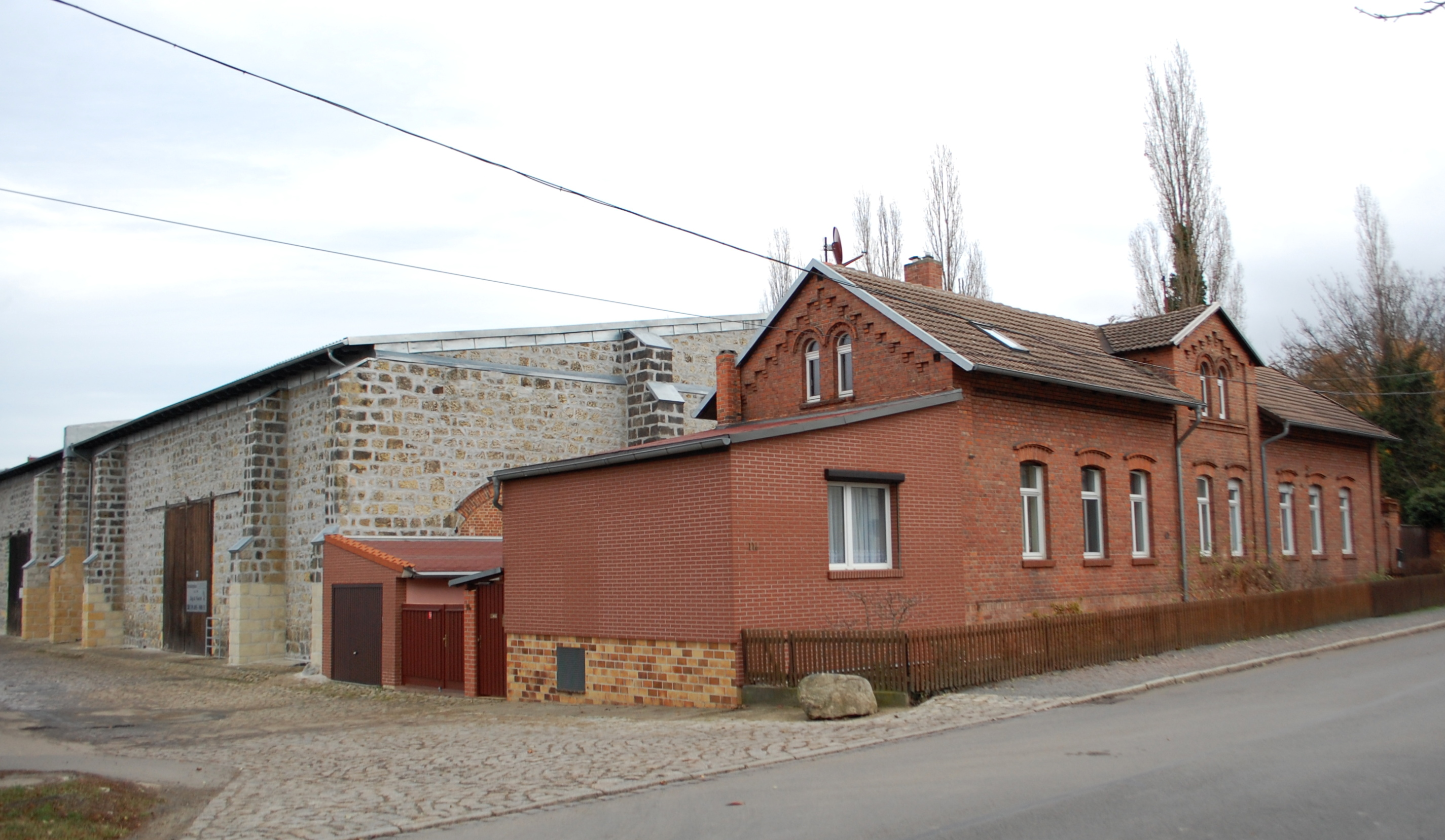 ehemaliges Vorwerk